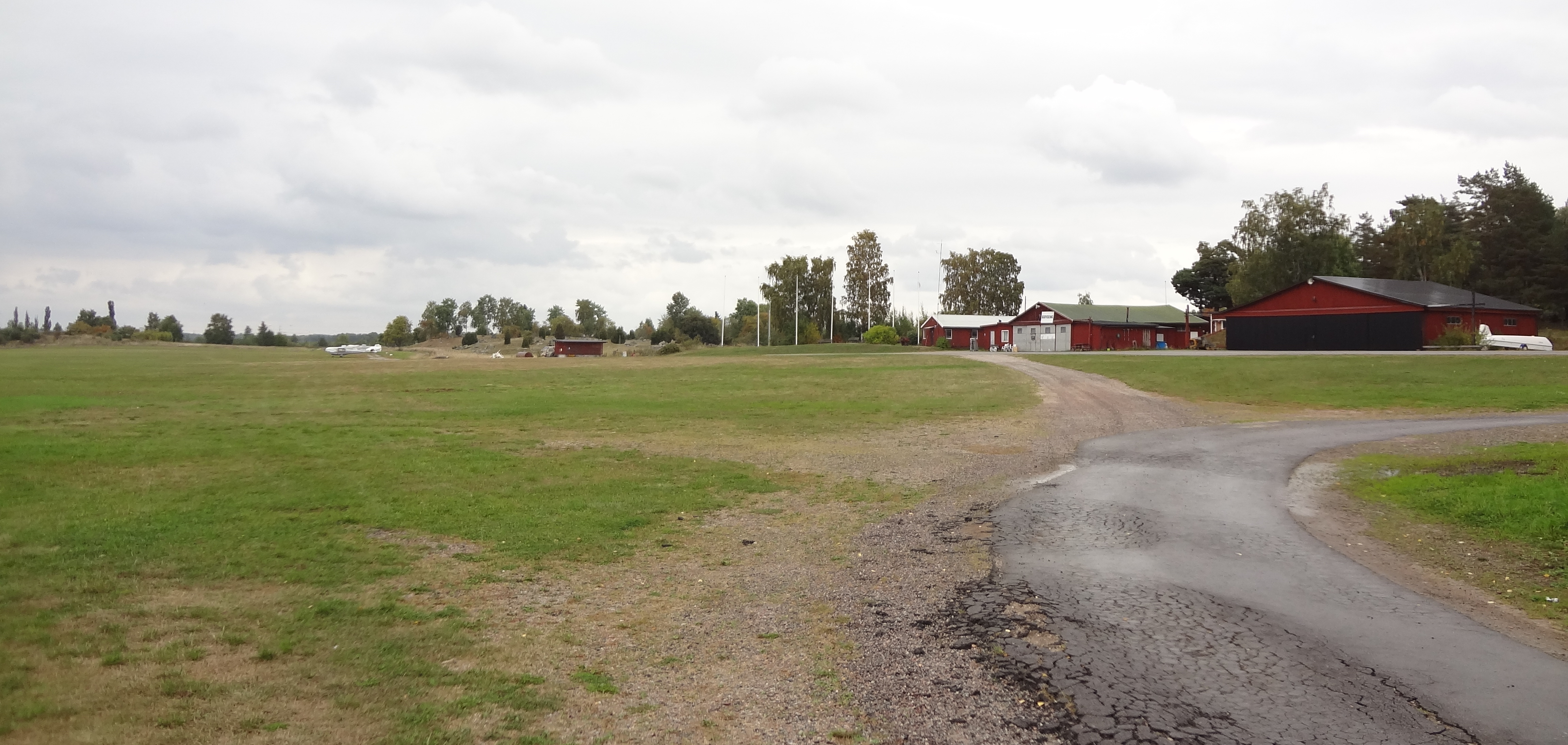 Eskilstuna flygklubbs hangarer vid Ekeby flygfält i Eskilstuna.